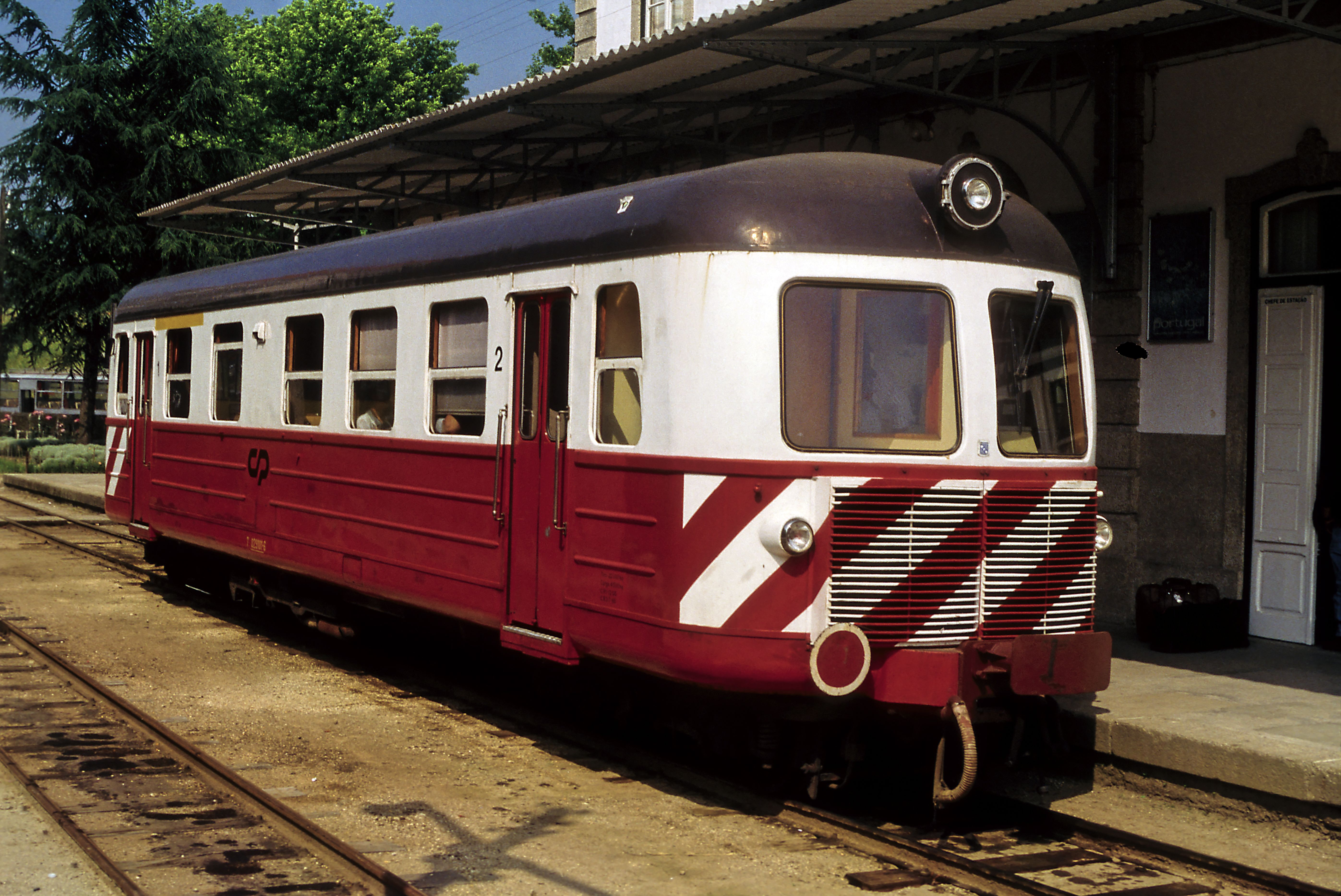 Bf Amarante (Linha do Tâmega, Portugal), NOHAB-Triebwagen auf Meterspur